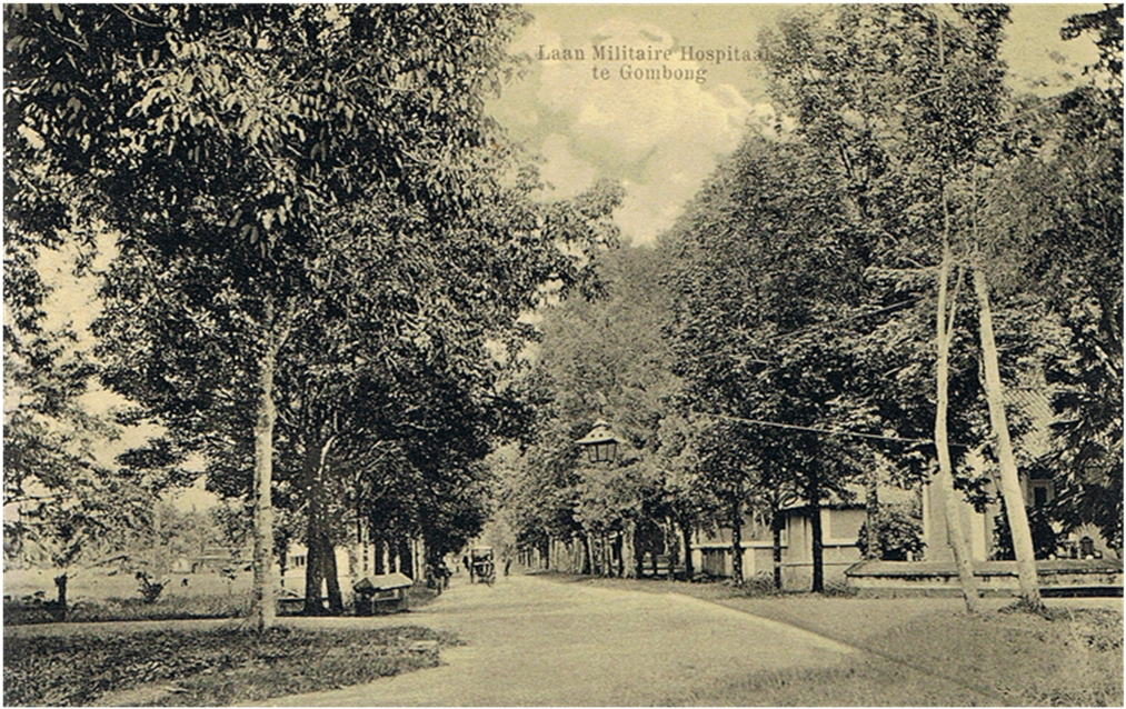 Het militaire hospitaal van het KNIL te Gombong.